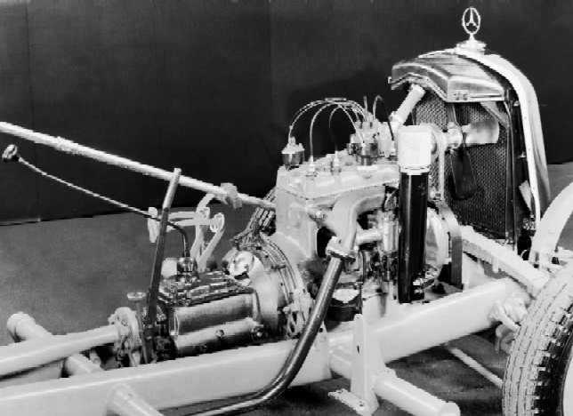 Bildbeschreibung: 170 V, synchronisiertes Getriebe, 1936-1952 Quelle: Mediaseite der DaimlerChryslerAG Genehmigung: Gern können Sie für Ihre Tätigkeit für die Wikipedia Inhalte der DaimlerChrysler Medienseiten verwenden. Dazu erkennen wir die Bedingungen nach GNU-FDL an. Das Angebot bezieht sich auch auf die vorhandenen Bilder.(Dr.Josef Ernst, Communications, DaimlerChrysler AG)